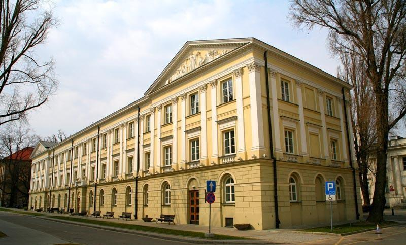 Warszawa (Polska)